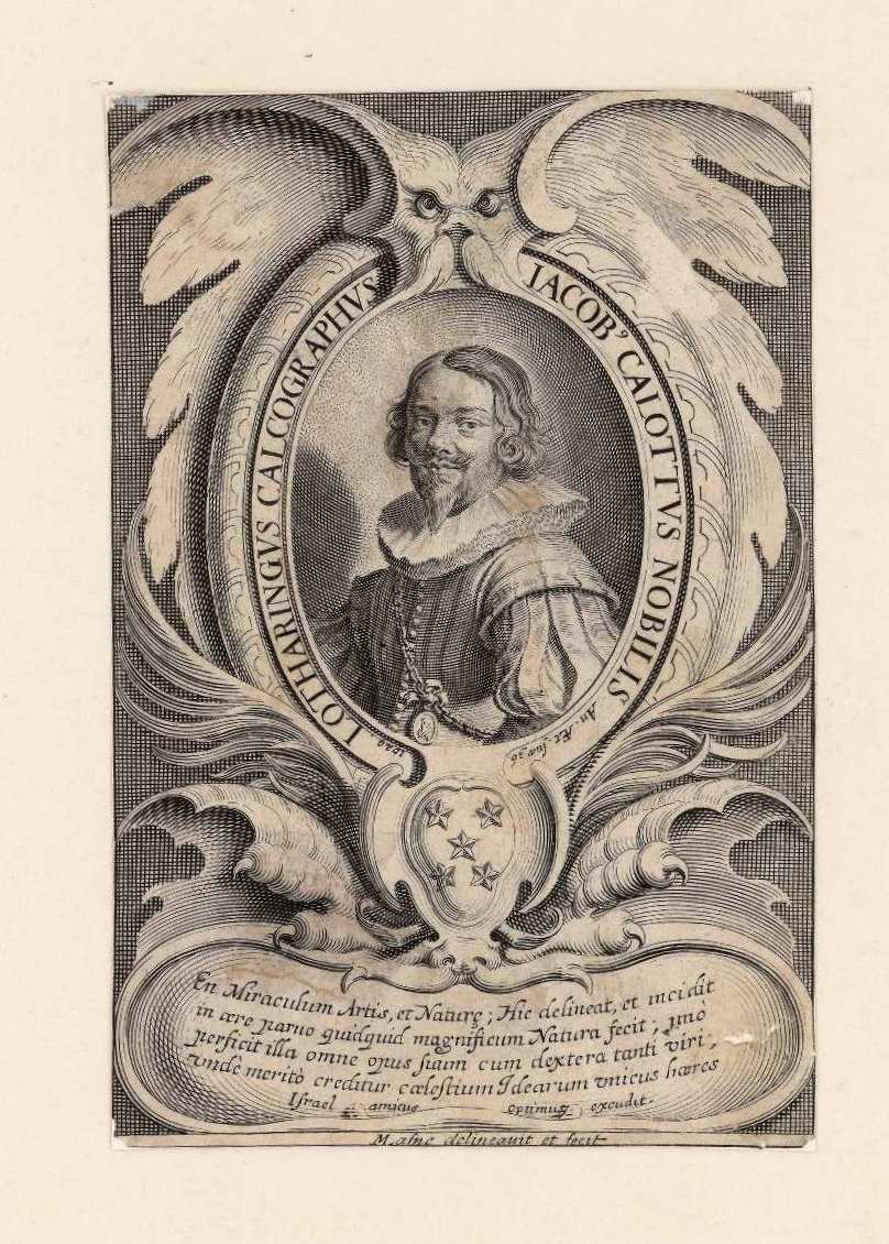 Retrato de Jacques Callot. Inscripción en la orla: "IACOB CALLOTVS NOBILIS LOTHARINGVS CALCOGRAPHVS An. AE. suae 36 MLasne delineauit et fecit"